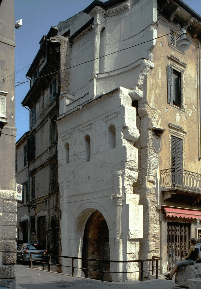 Verona, Porta dei Leoni